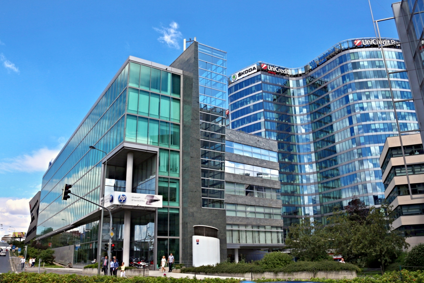 BB Centrum, budovy